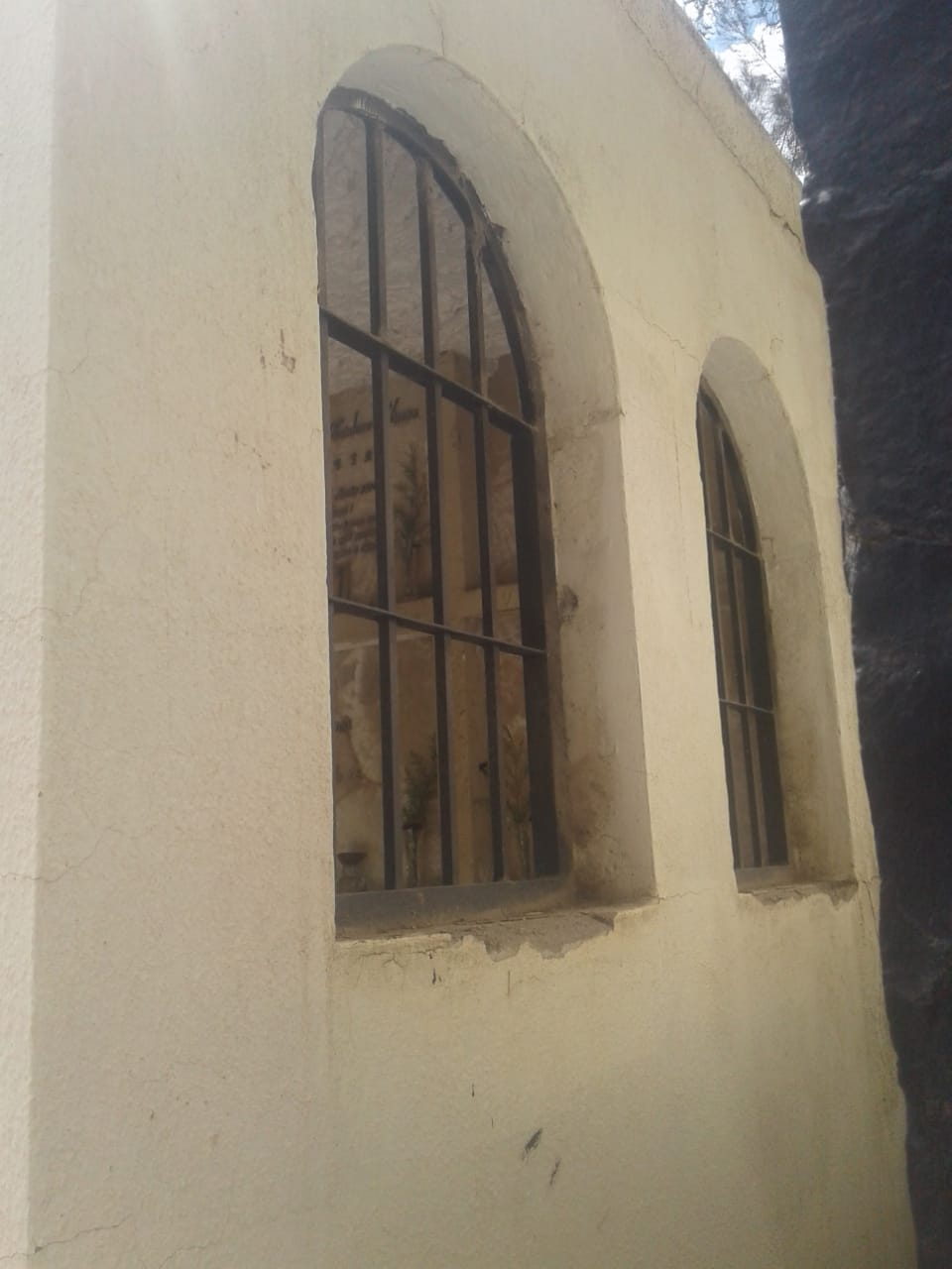 dos ventanas en el muro del lado derecho del mausoleo